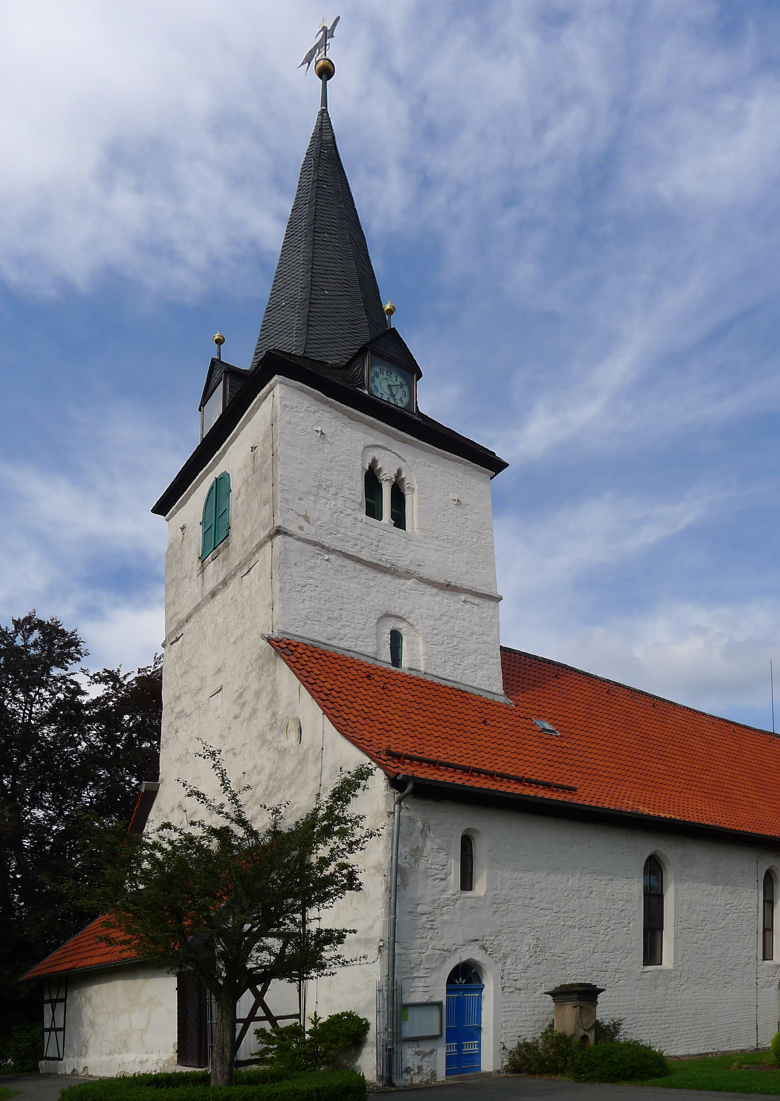 Blick auf den Eingang zur Kirche.